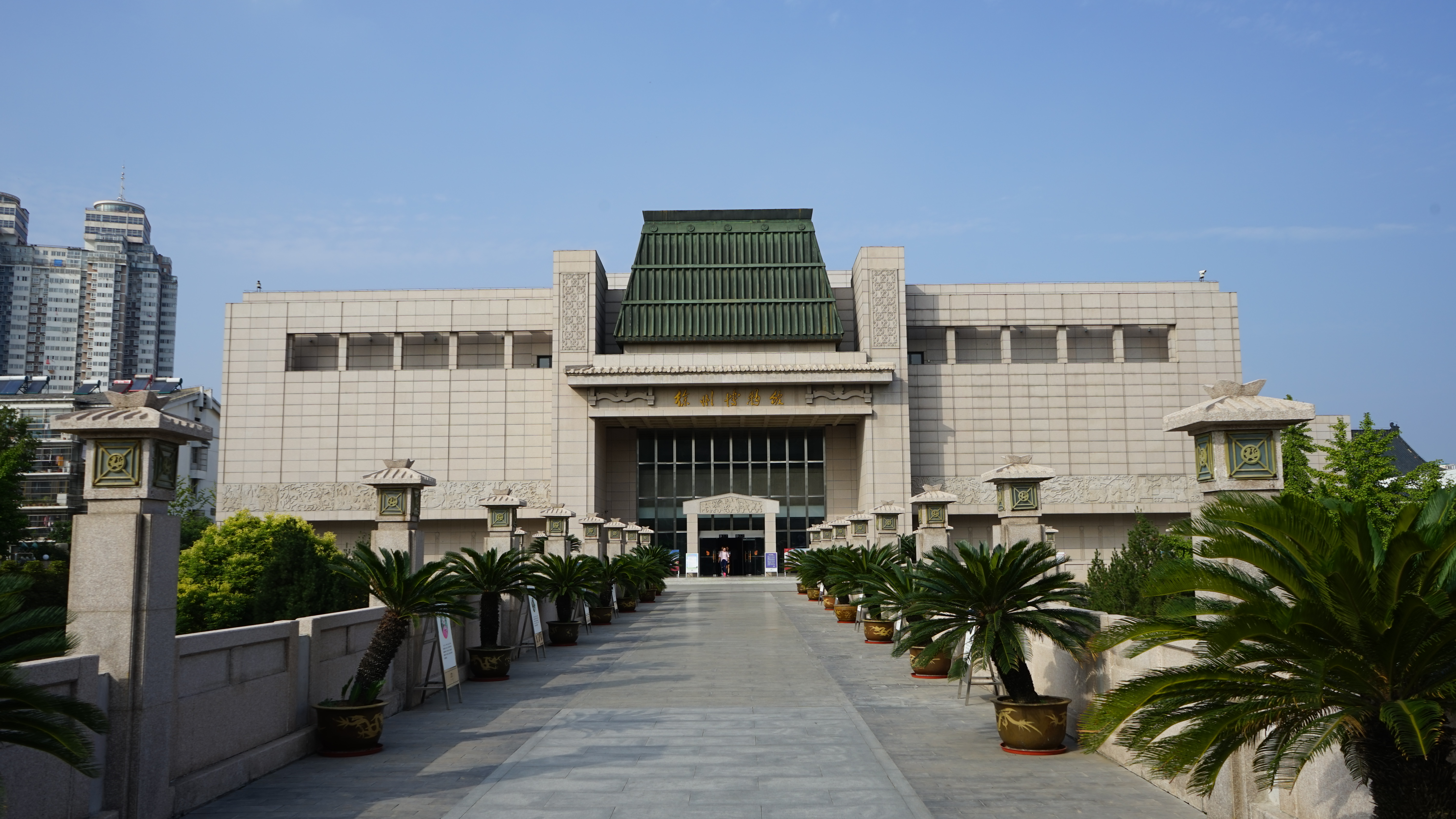 徐州博物馆